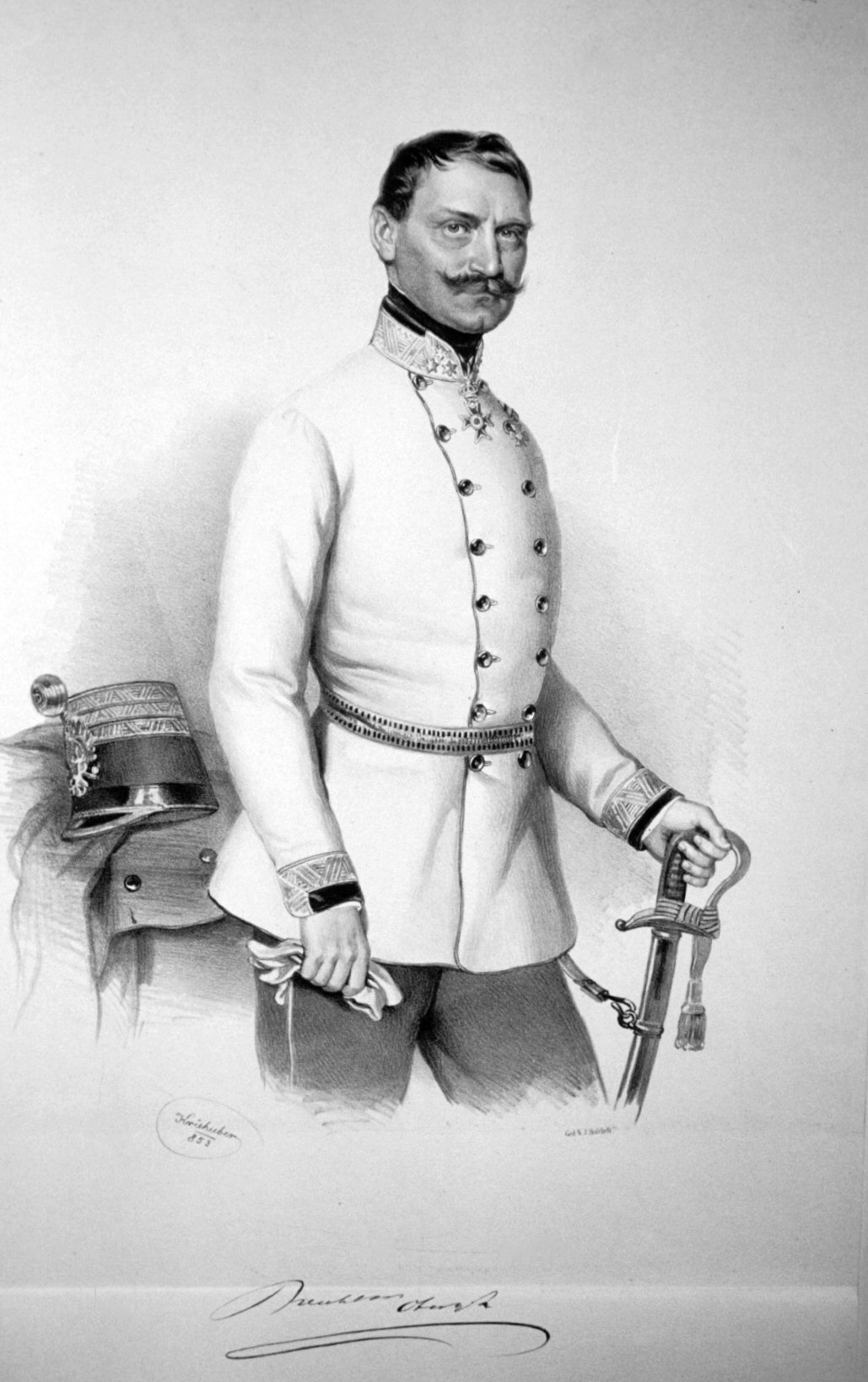 Josef Reichlin Freiherr von Meldegg (1804-1886), Feldmarschallleutnant, Geheimrat. Lithographie von Josef Kriehuber, 1853, als Oberst